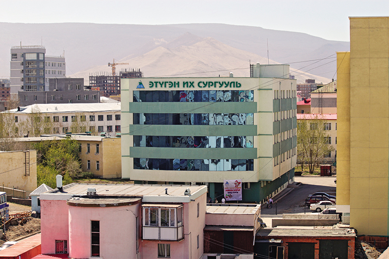 Монгол: Этүгэн 1 байр